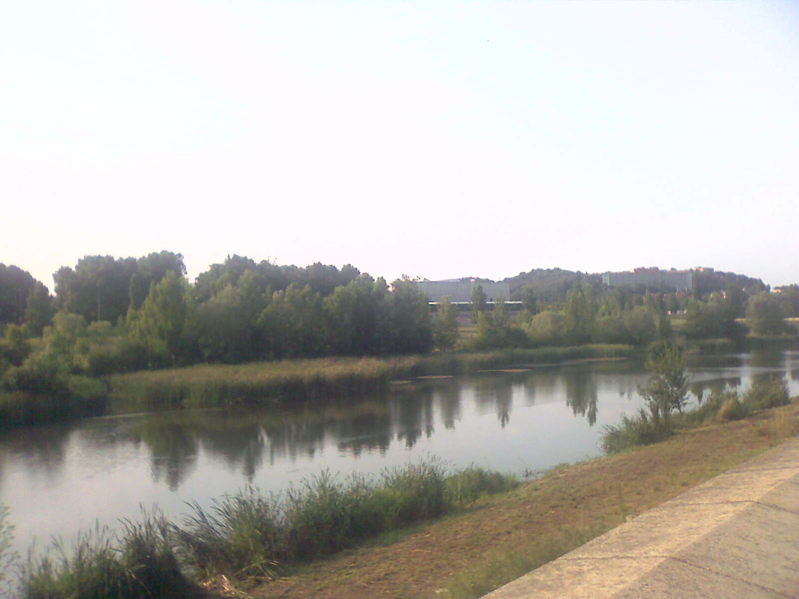 Union Rio Güell con Rio Ter